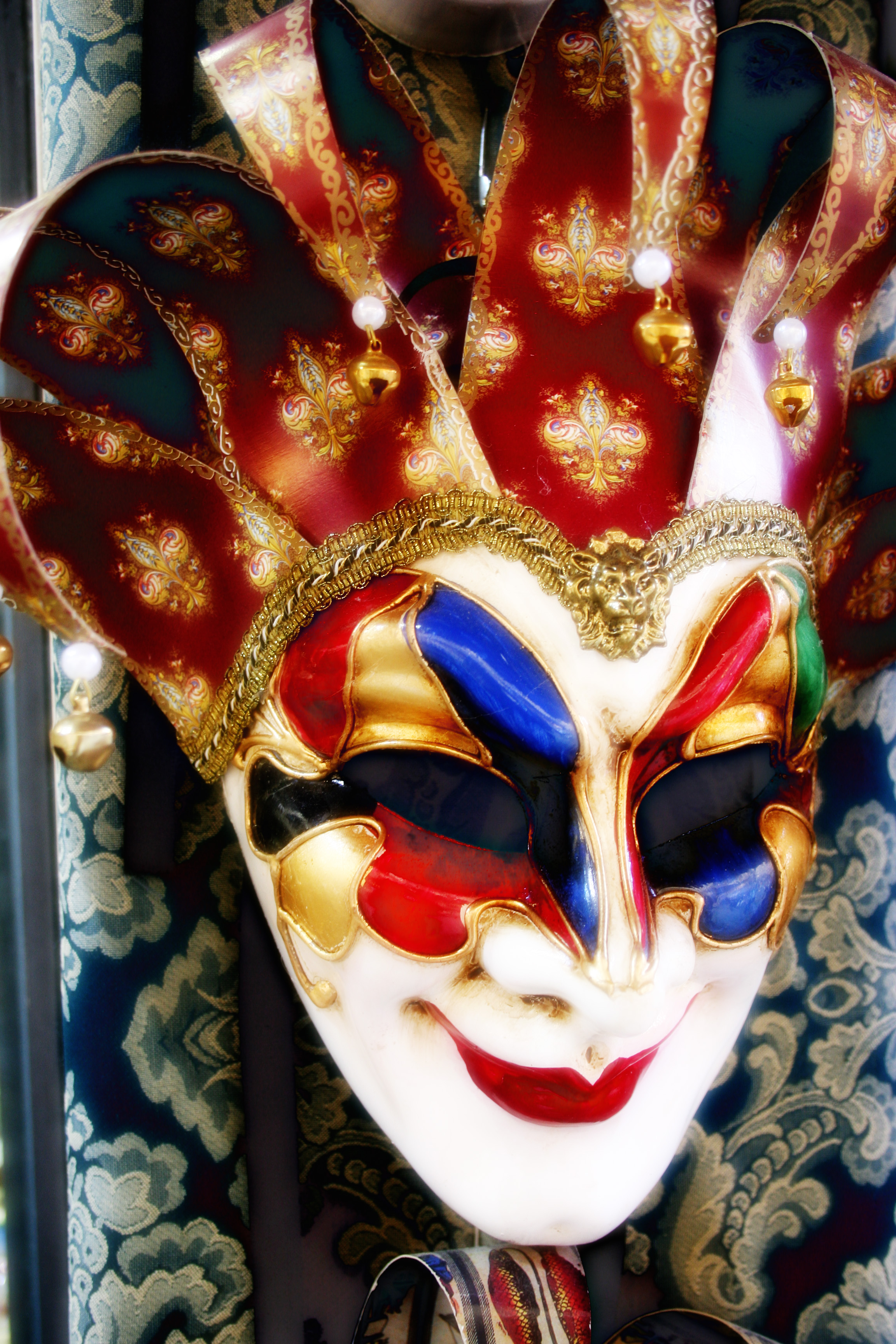 A female joker (Venice)